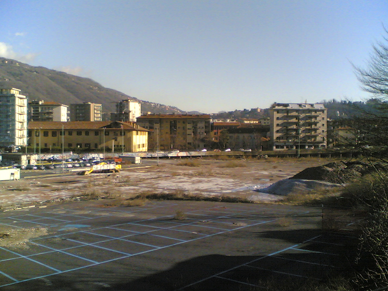 Foto dell'area ex Ticosa a Como